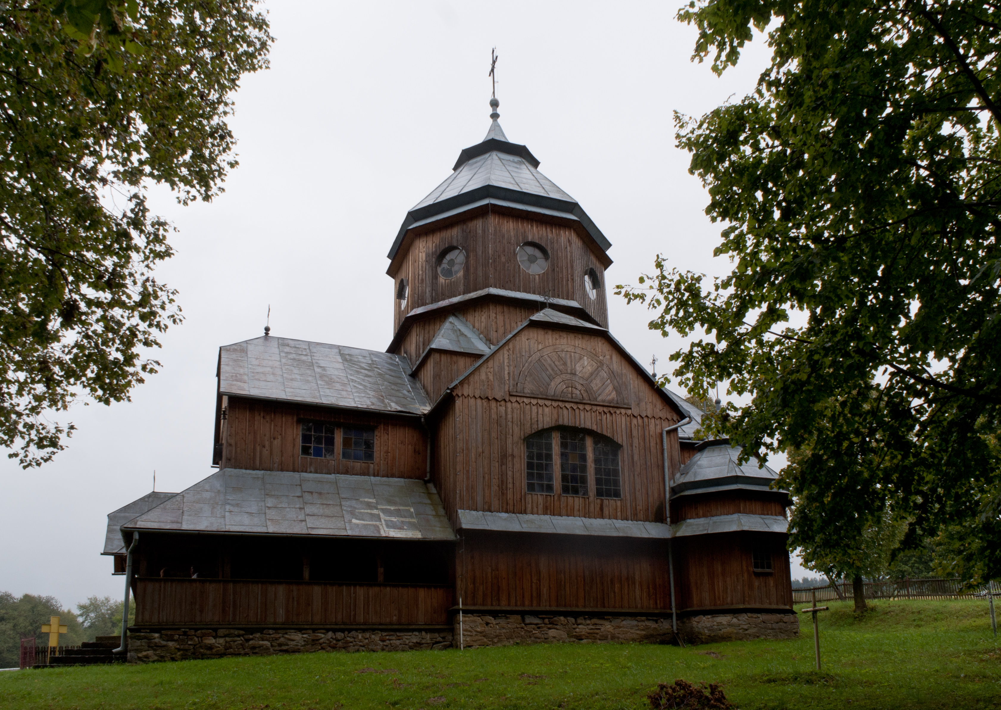 Dawna cerkiew pw. Opieki Najświętszej Maryi Panny w Roztoce, obecnie kościół rzymskokatolicki pw. św. Piotra i Pawła w Roztoce.